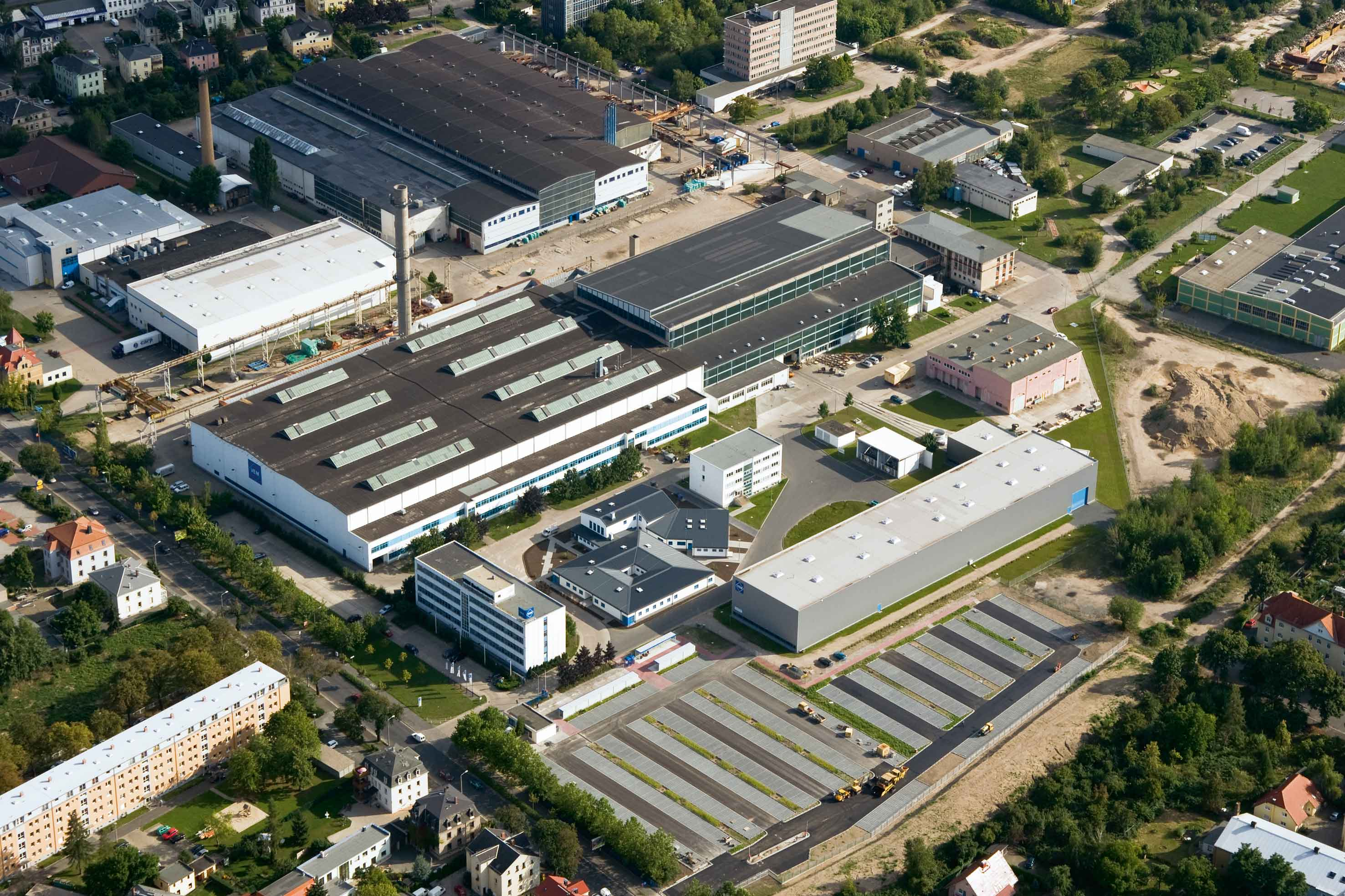 VEM Sachsenwerk GmbH, Dresden - Luftbild